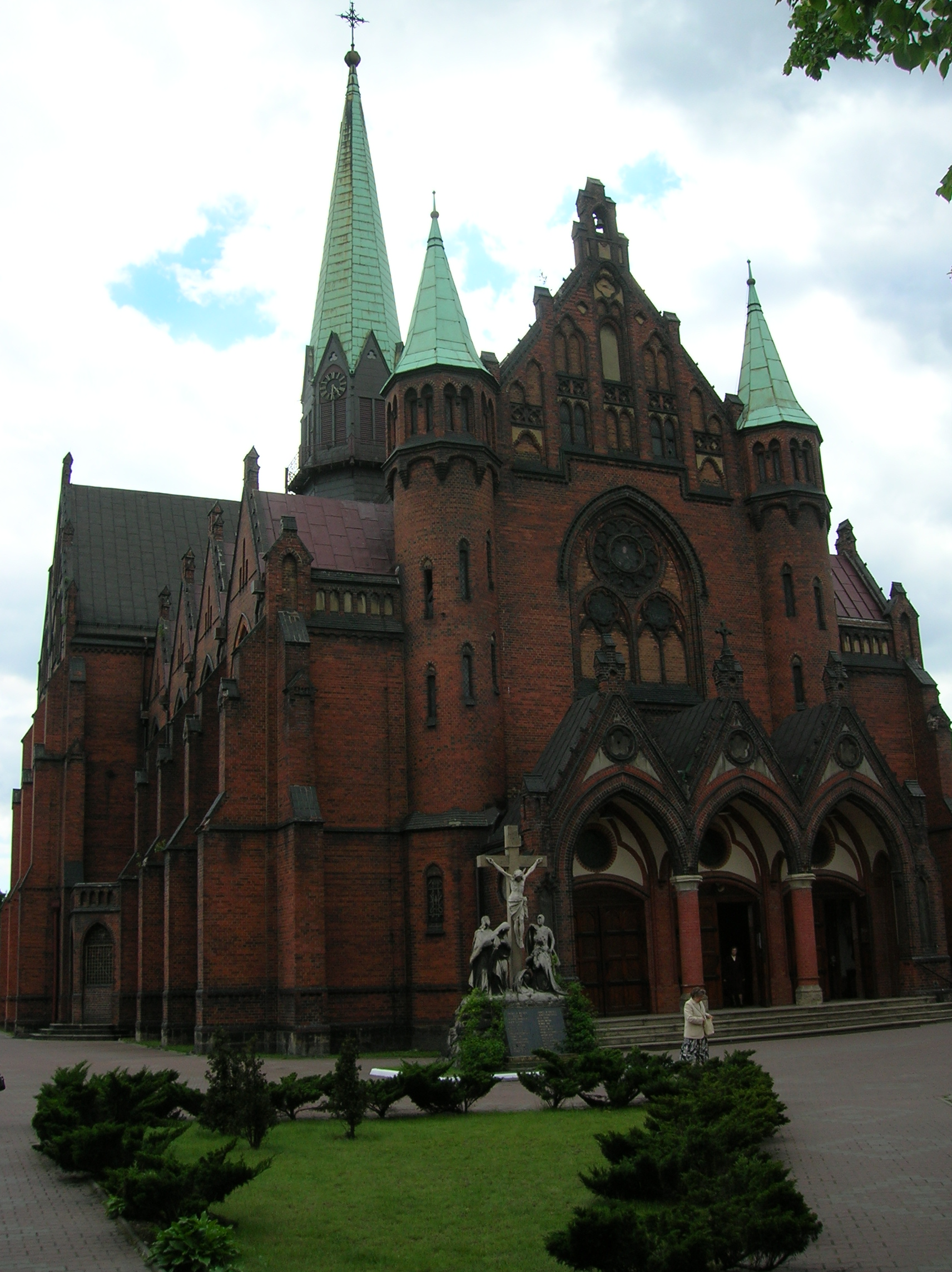 Katowice Załęże, kościół, widok frontalny